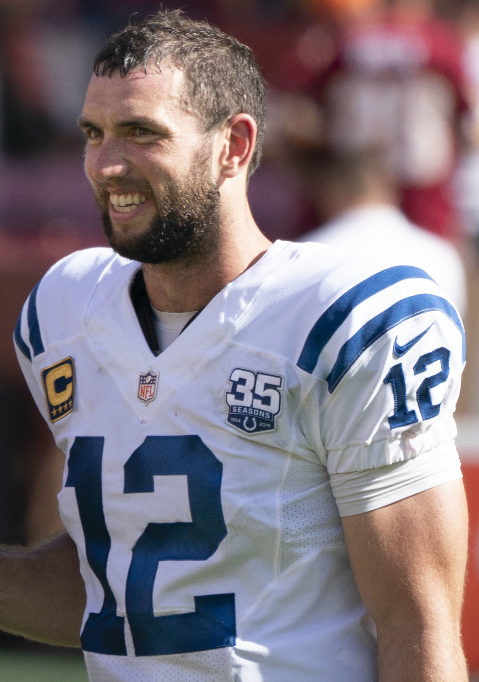 Colts at Redskins 09/16/18